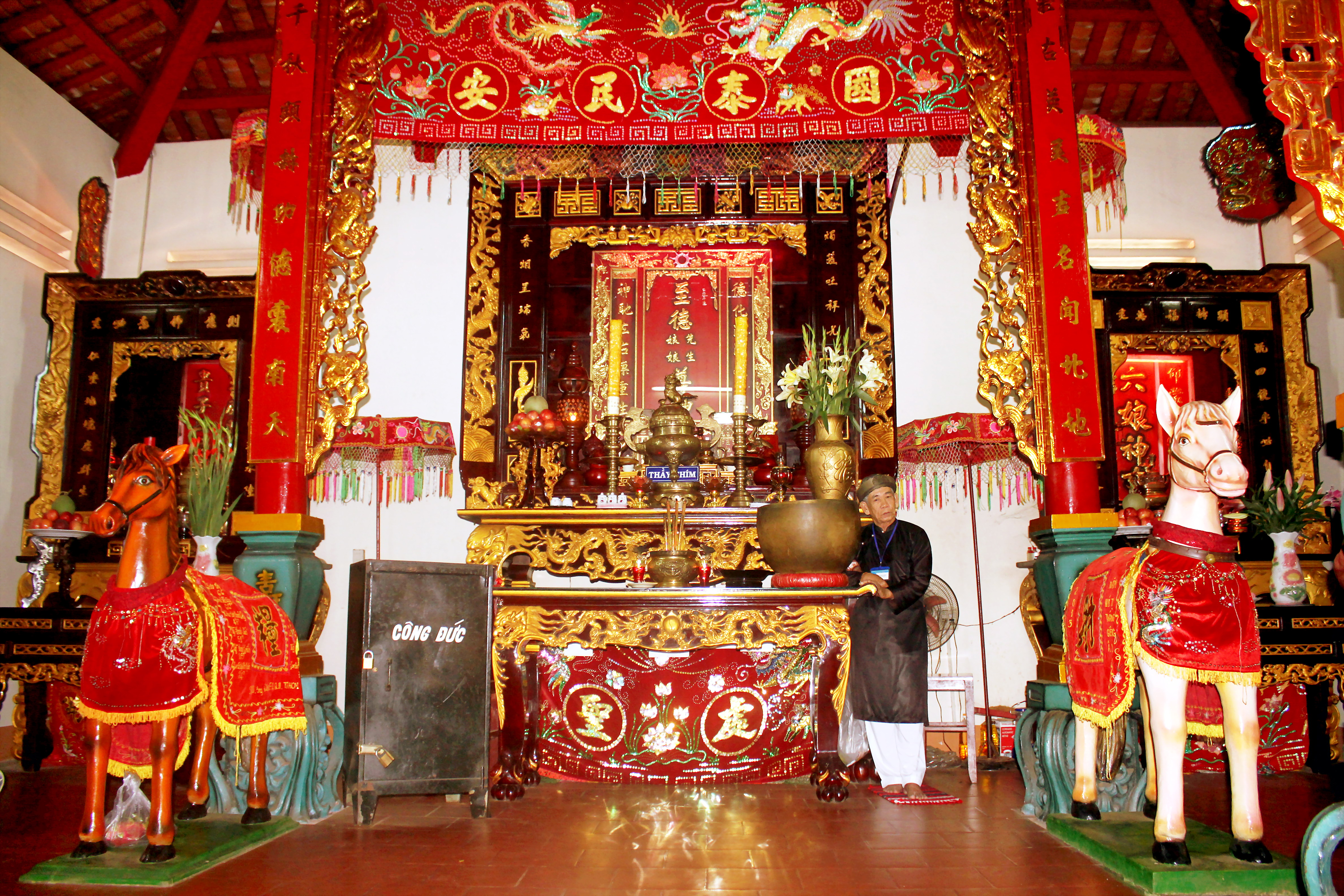 Gian thờ chính trong Dinh Thầy Thím ở xã Tân Hải, thị xã La Gi, tỉnh Bình Thuận, Việt Nam.